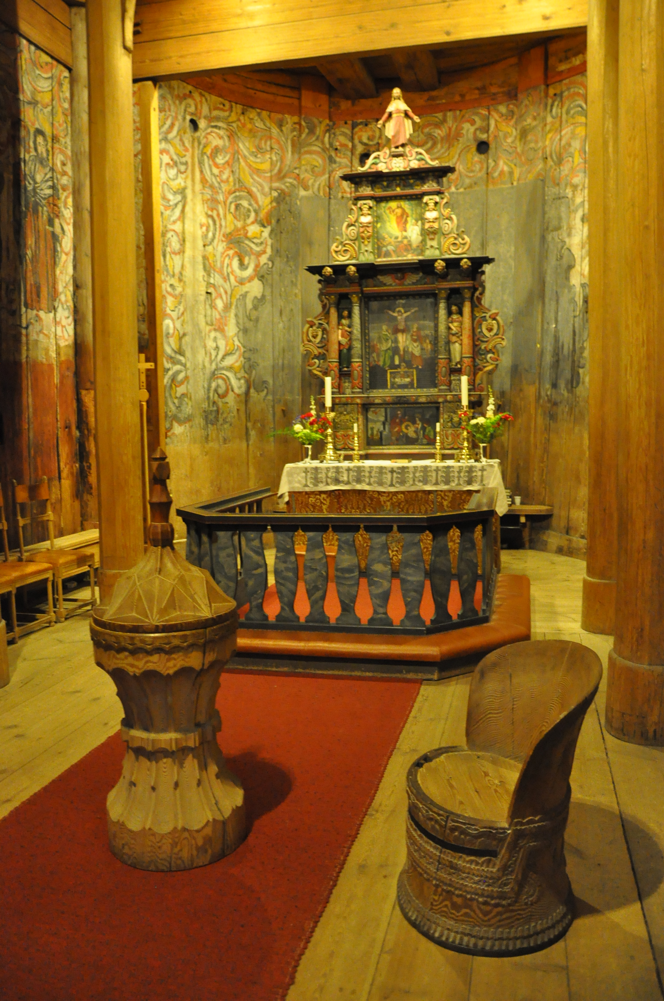 Koret i Heddal stavkyrkje